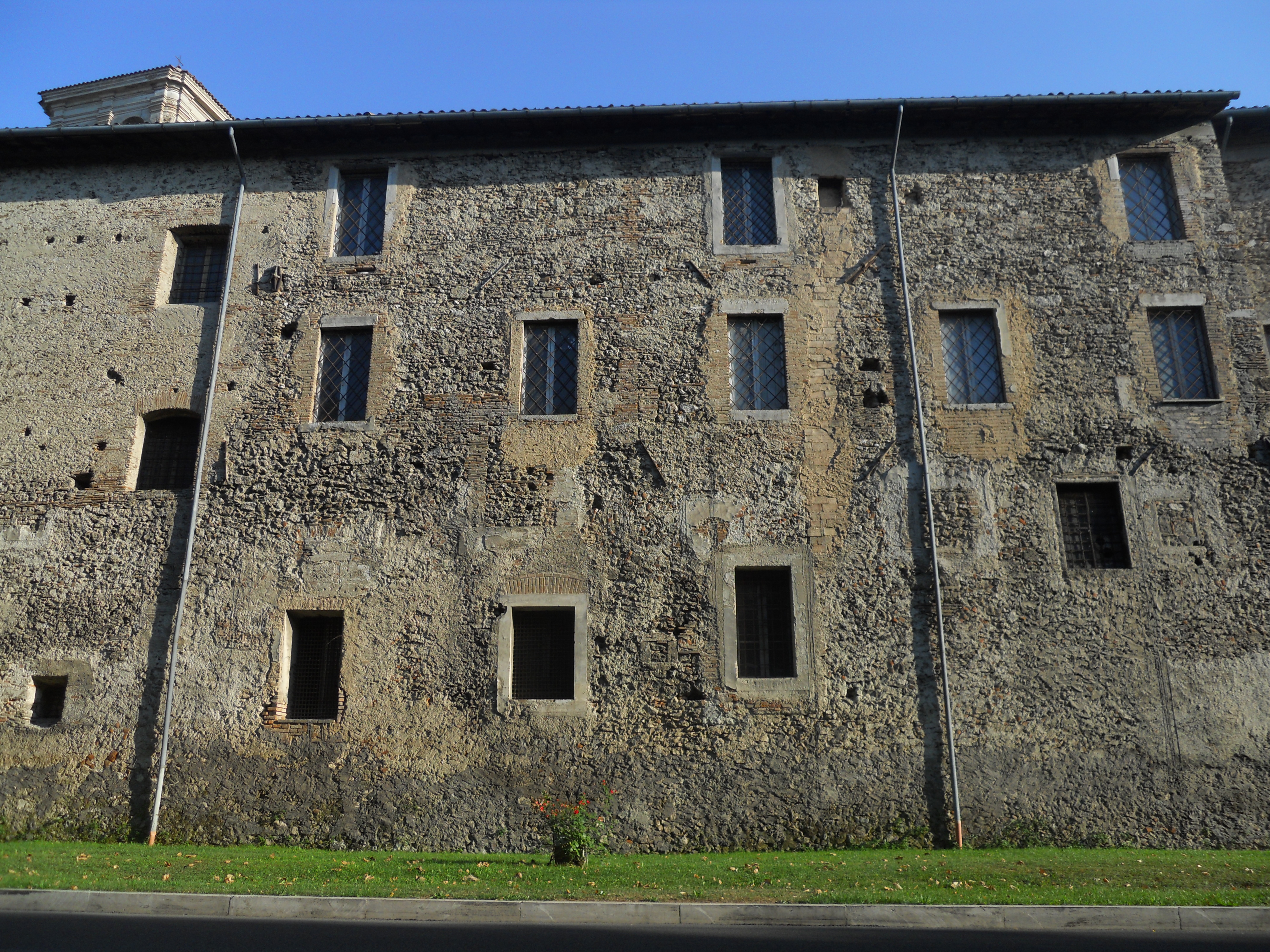 Mura di Rieti - adattate ad abitazioni, nel tratto prima dell'interruzione di porta d'Arci